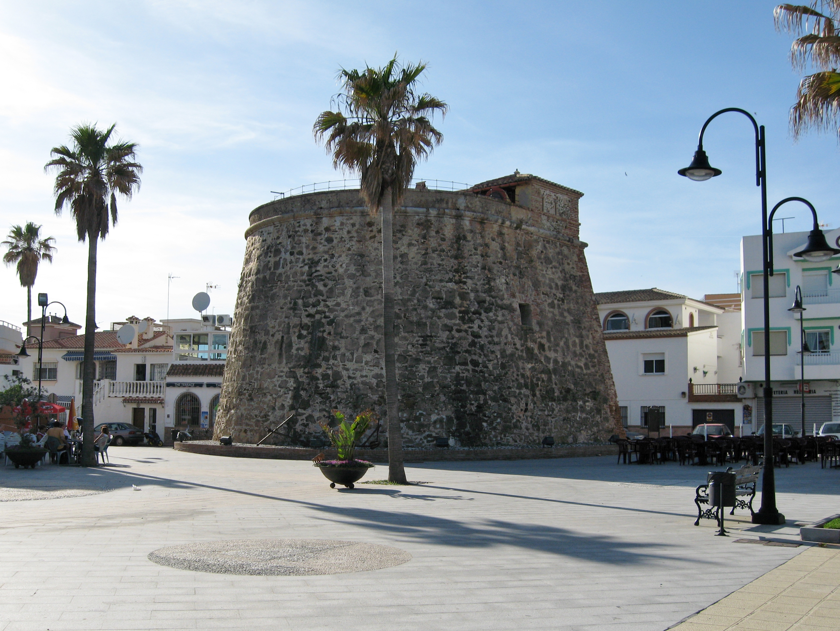 Wachturm (Torres Vigias) von La Cala, Gemeinde Mijas, Provinz Málaga, Andalusien, Spanien